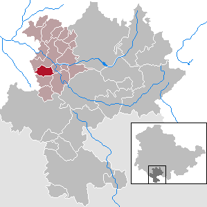 Beinerstadt in Thuringia - district Hildburghausen